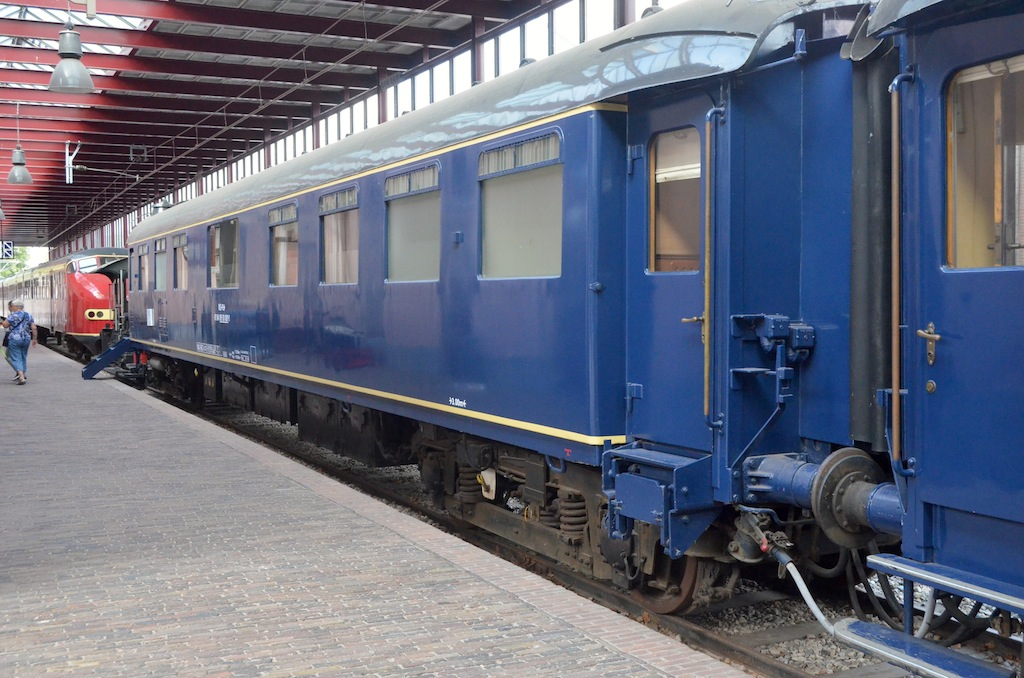 Nederlands Spoorwegmuseum rijtuig NS 9. Foto: Erik Swierstra.